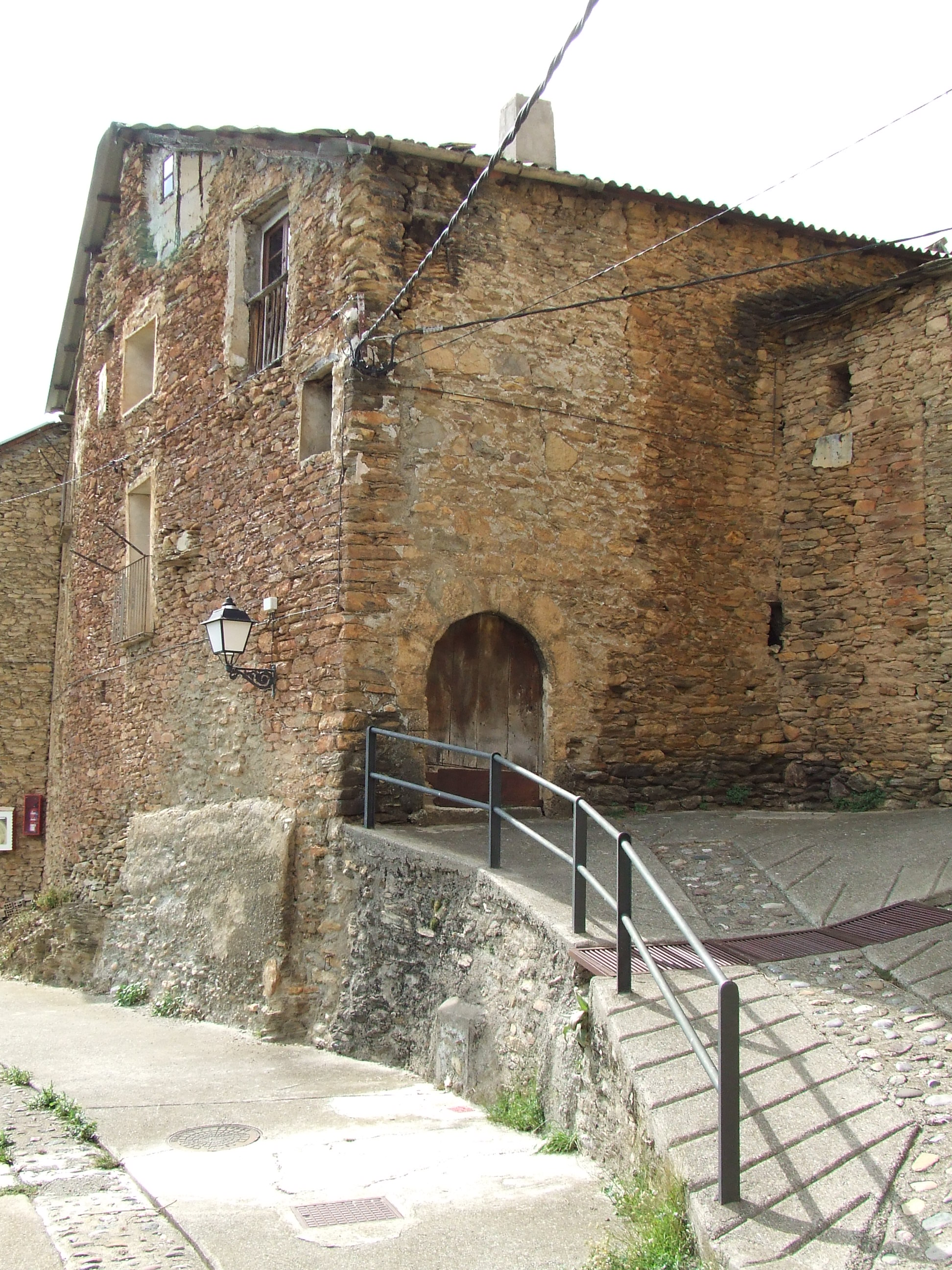 Una casa d'Astell (la Torre de Cabdella, Pallars Jussà)